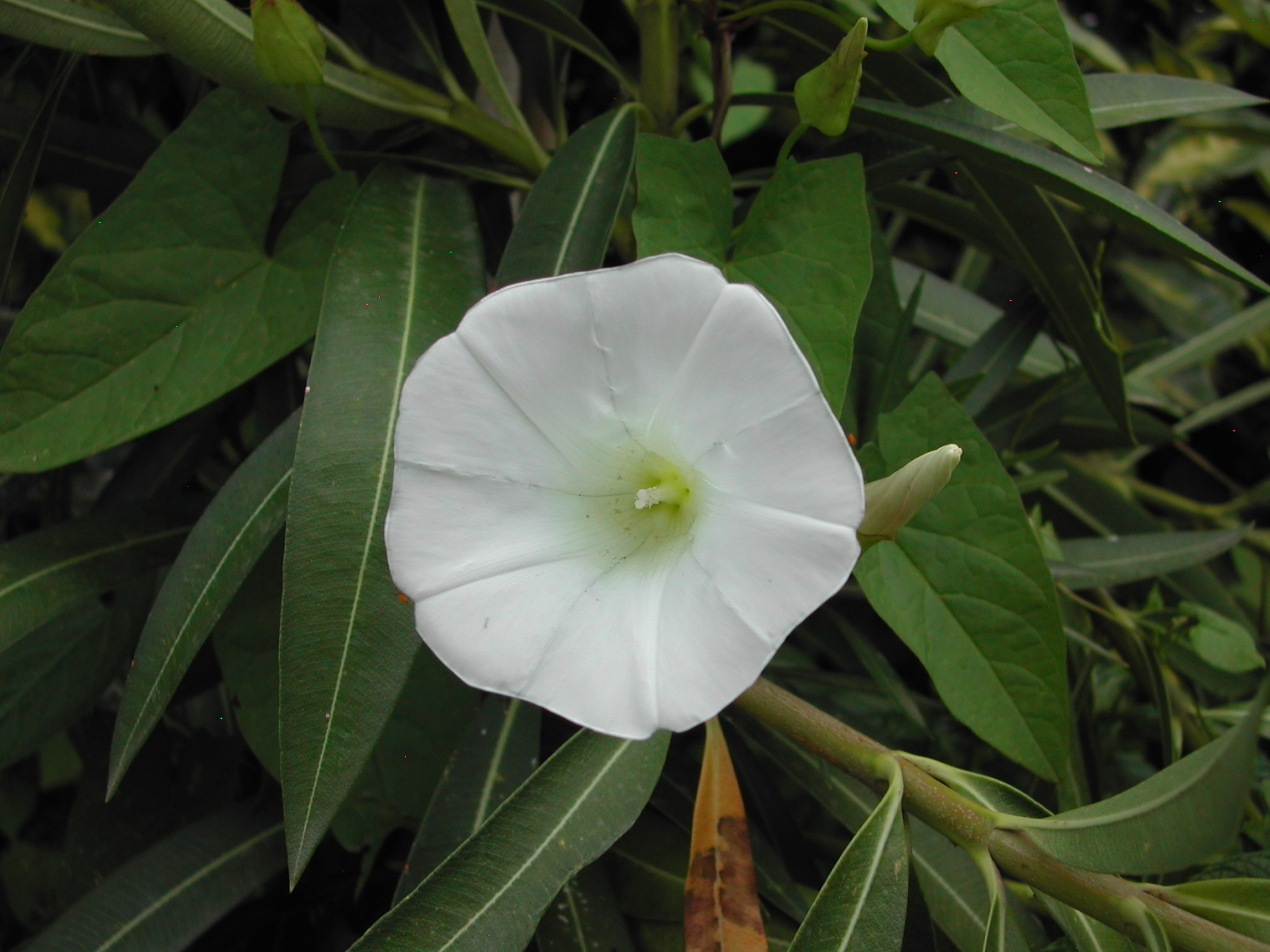 Calystegia sepium ovvero Vilucchio bianco ovvero Campanula